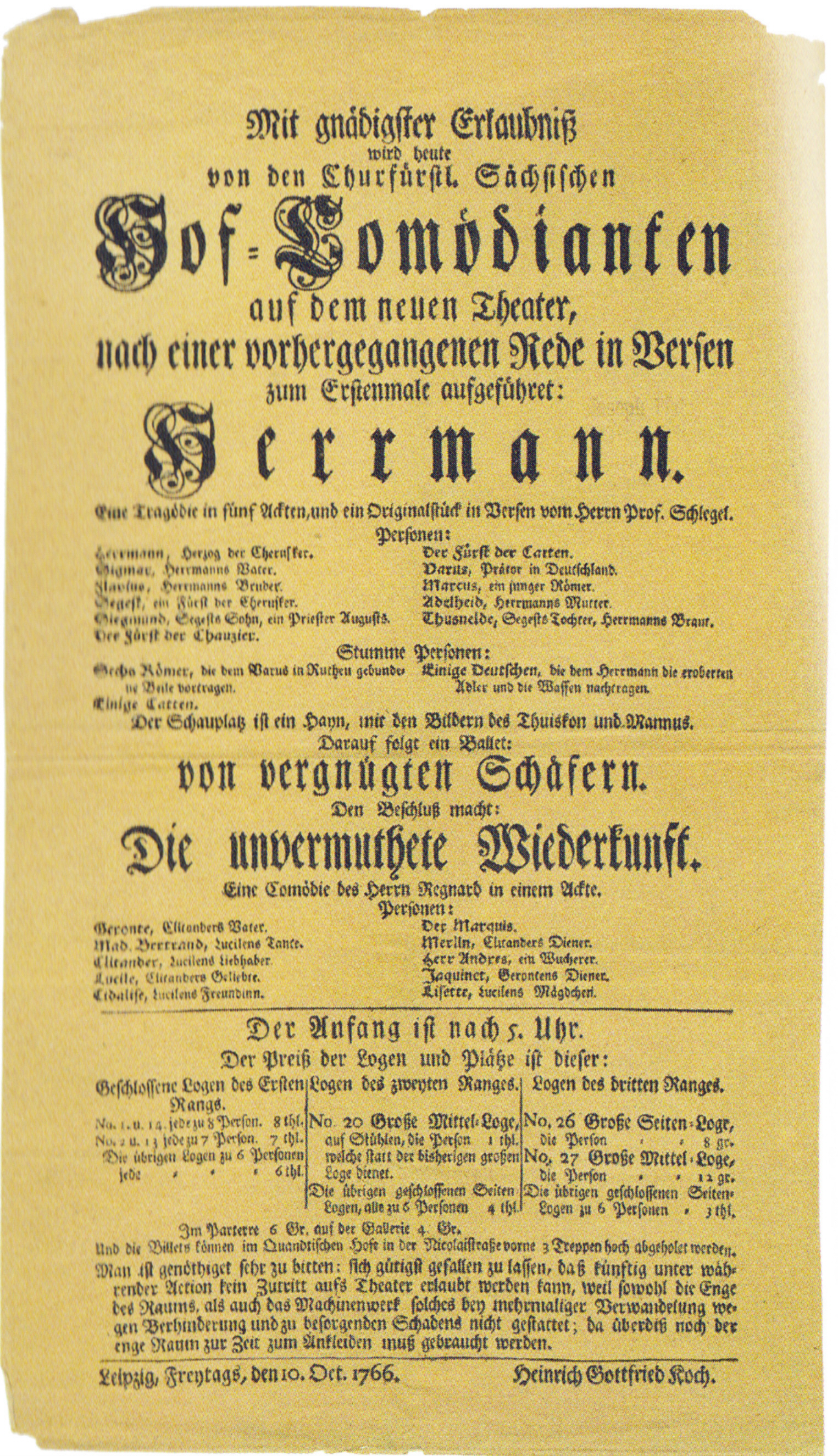 Theaterzettel zur Eröffnung des Komödienhauses Leipzig auf der Ranstädter Bastei am 10. Oktober 1766